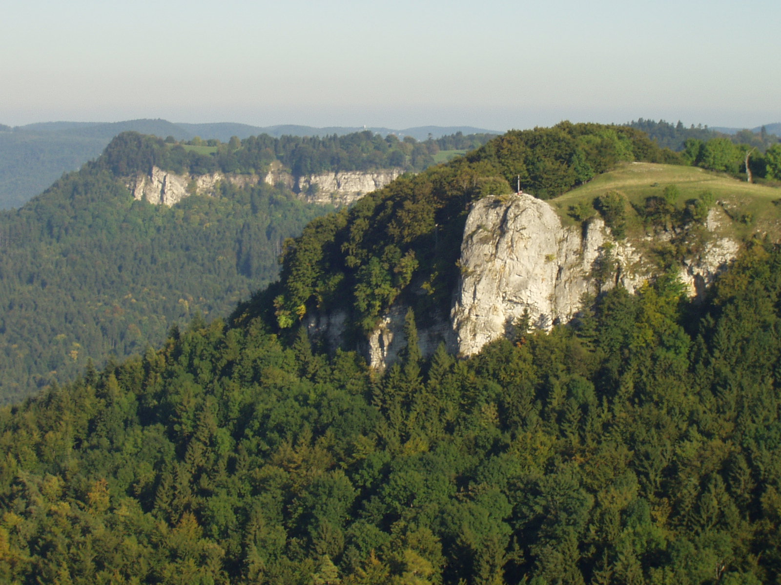 Lochenstein